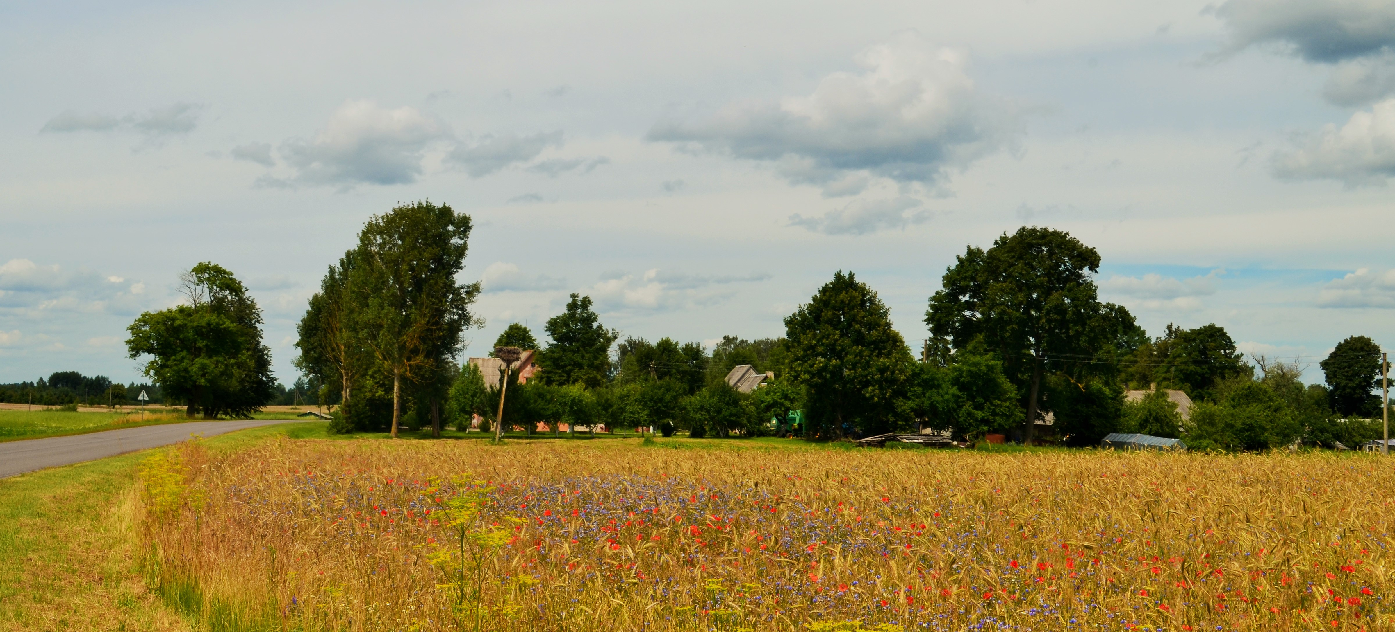 Šinkūnai, Ukmergės raj.